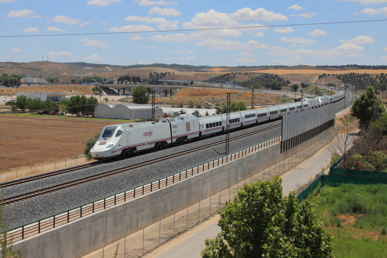 Doble de automotor 730 con Alvia Alicante a Madrid y Galicia. Aranjuez.